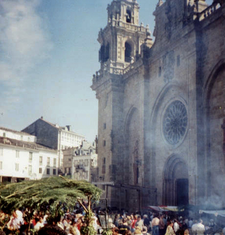 Catedral de Mondoñedo Fotografía tomada por mí en Agosto de 2000 y publicada bajo GFDL